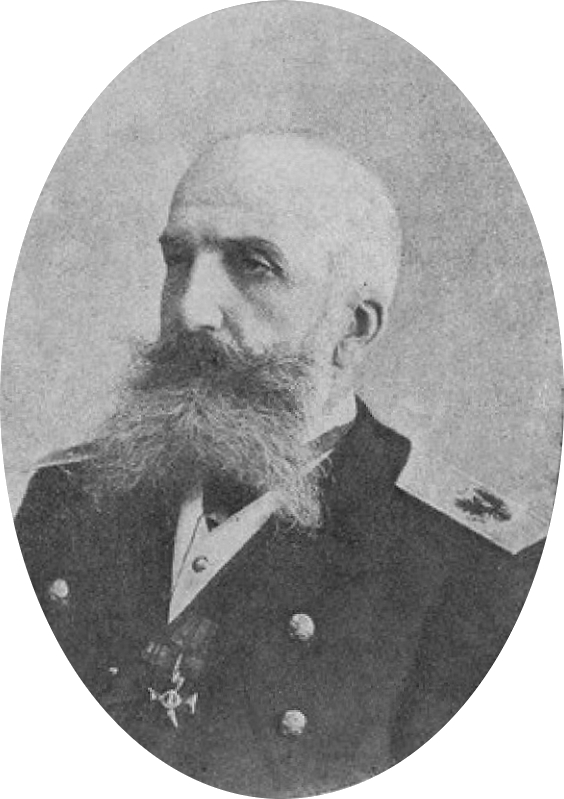 Римский-Корсаков, Николай Александрович контр-адмирал, архангельский губернатор, товарищ морского министра.